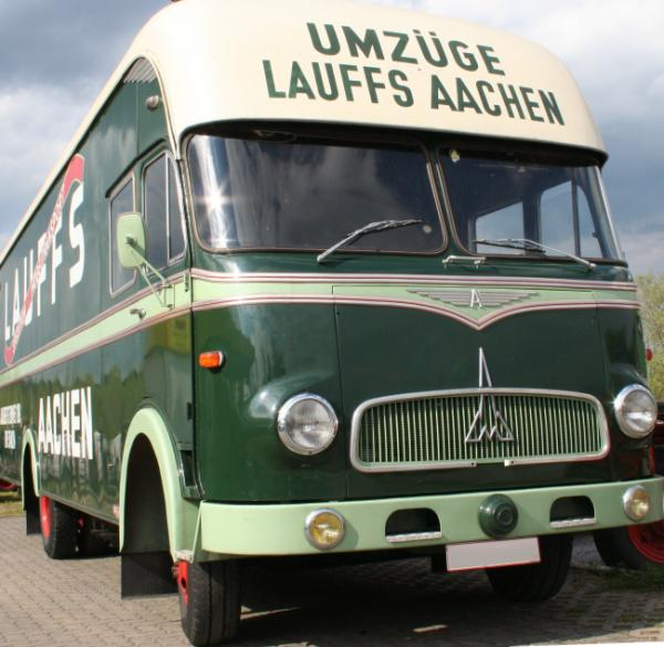 Magirus-Deutz Ackermann-Möbelwagen